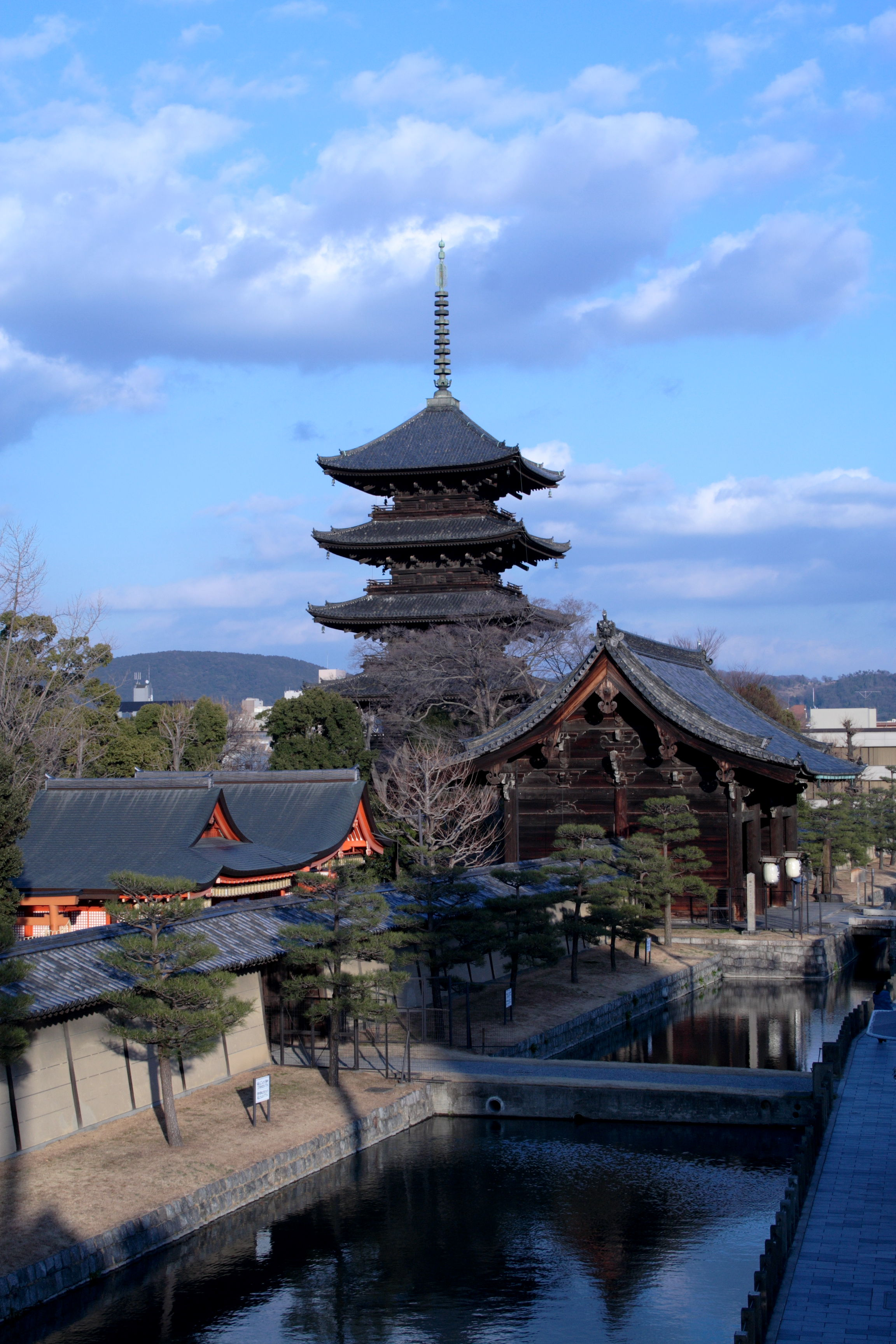 東寺/Tōji